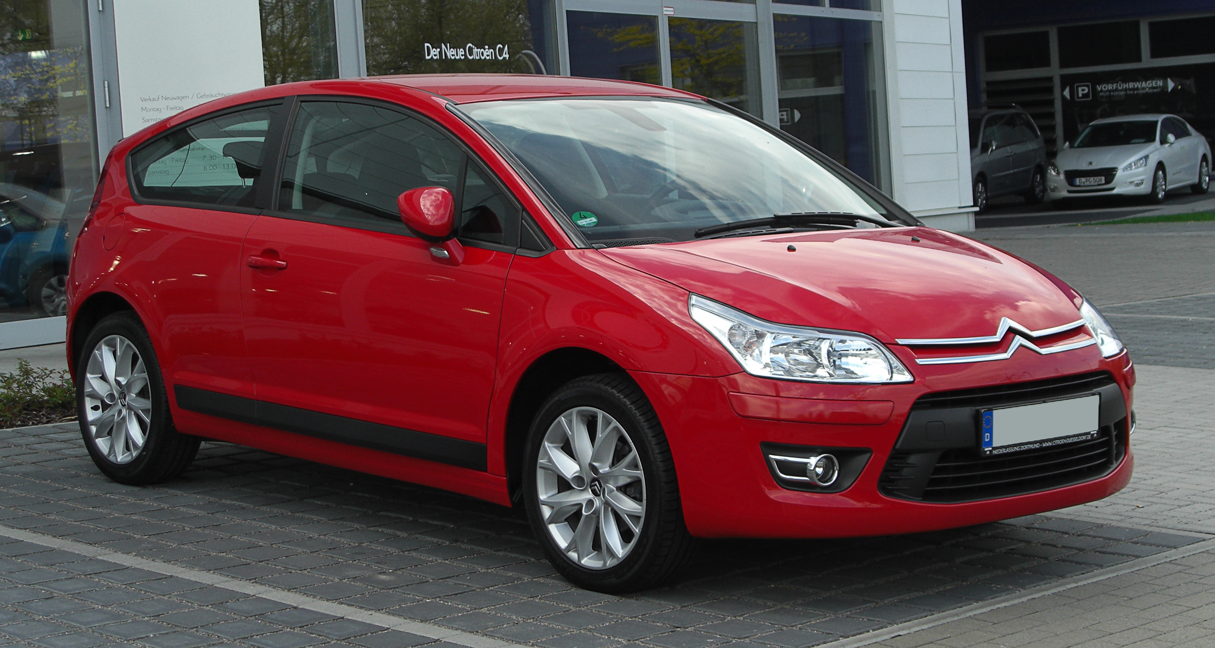 Citroen C4 Coupé THP 150 Tendance (I, Facelift)